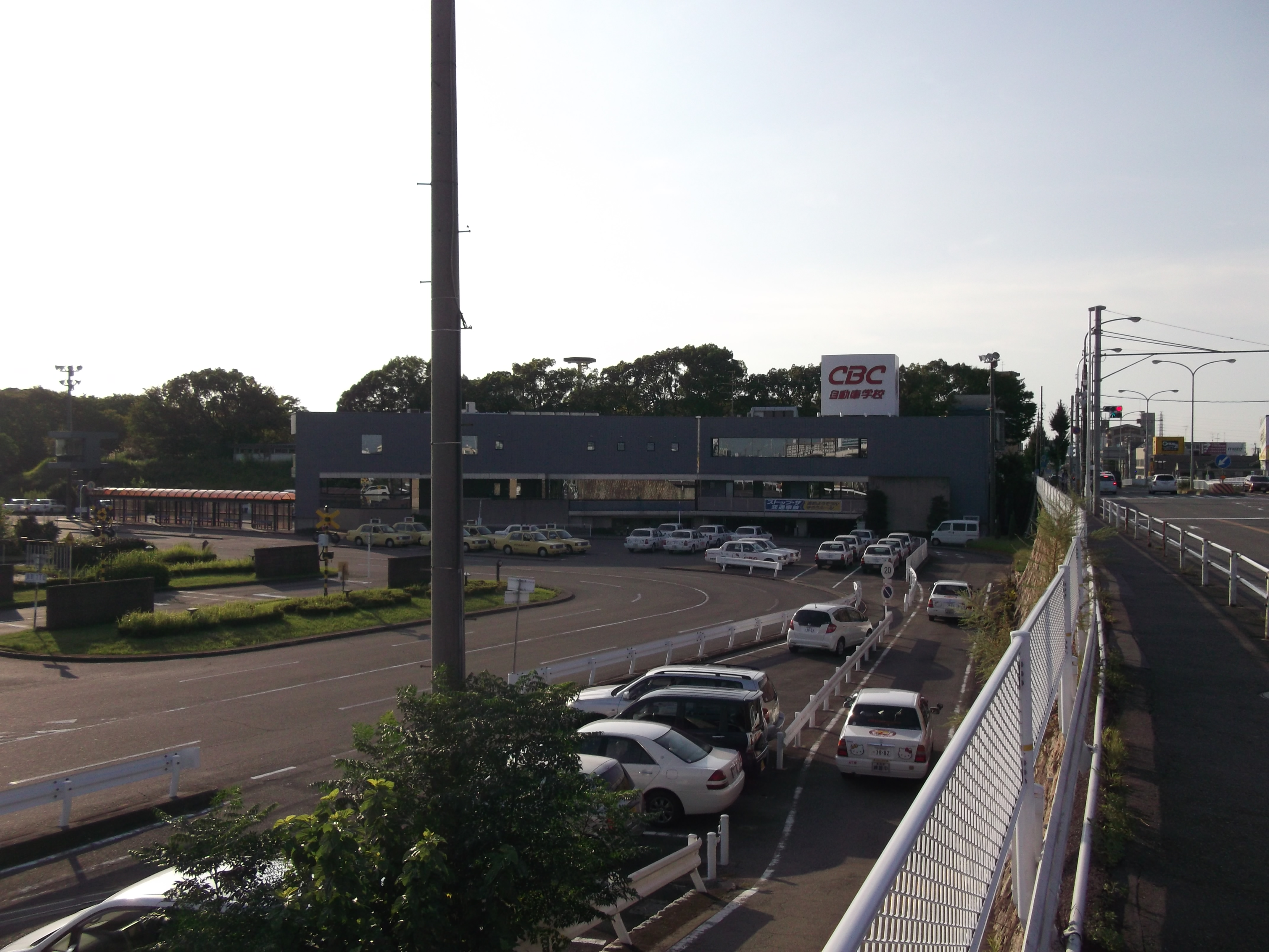 名古屋市西区のCBC自動車学校を北東側公道南側より撮影。